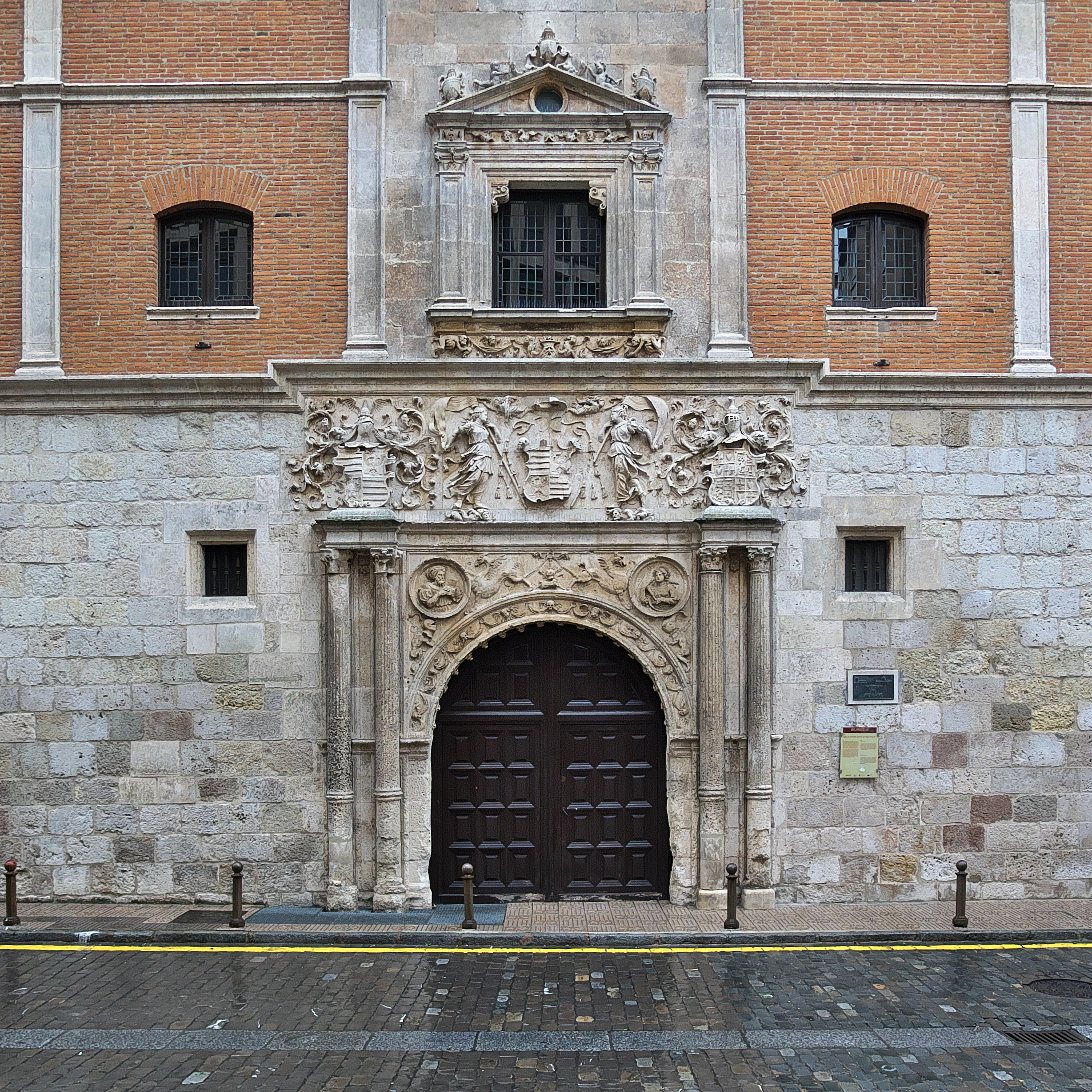 Portada de la casa del canónigo Francisco de Miranda Salón (1545). Una de las principales muestras del renacimiento civil en Burgos. Atribuída a la maestría de Juan de Vallejo.